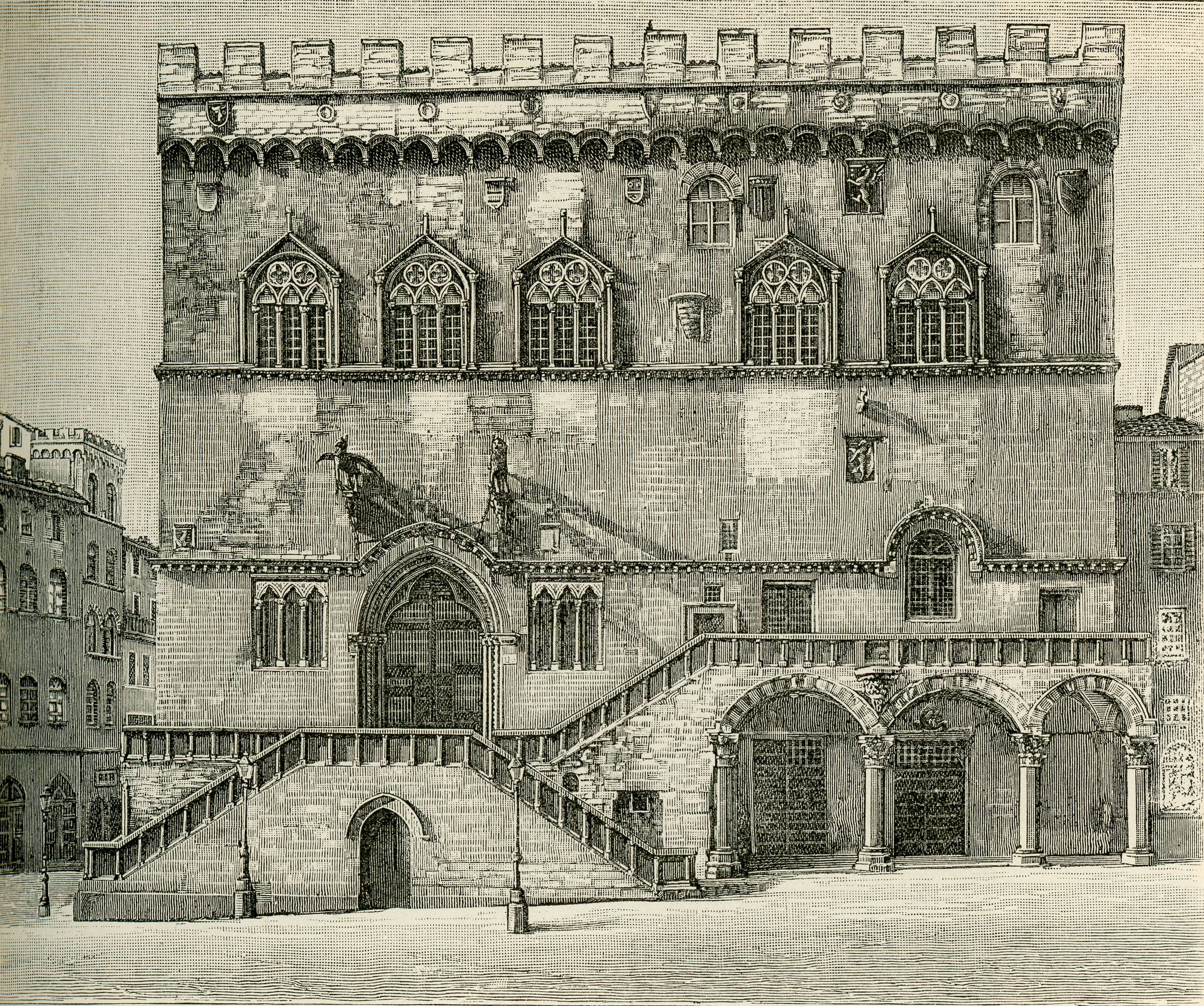 Perugia: Palazzo Pubblico (lato nord) (xilografia).